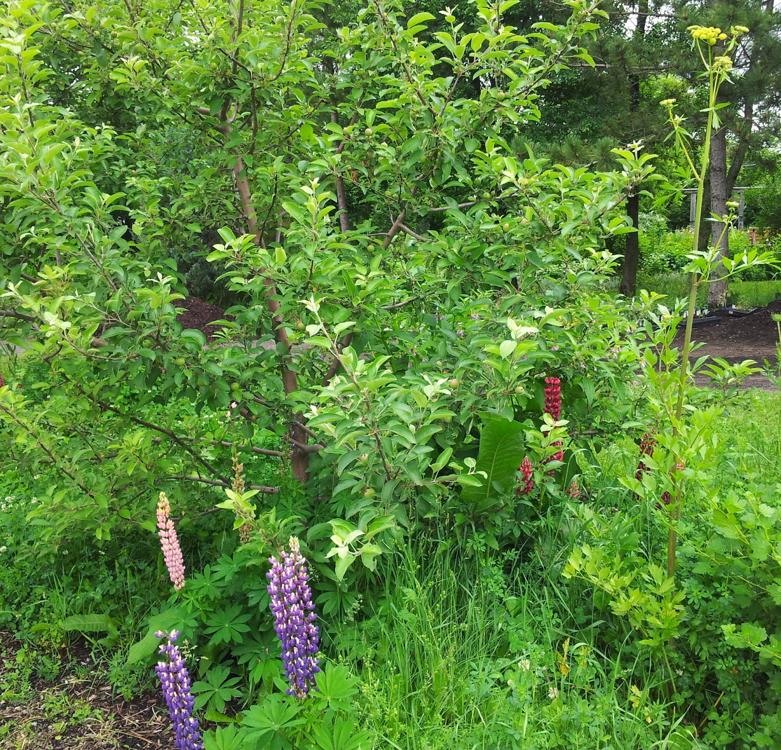 Forêts Nourricière créer par Wen Rolland.